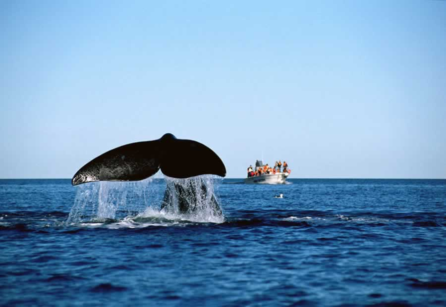 ballena en Argentina